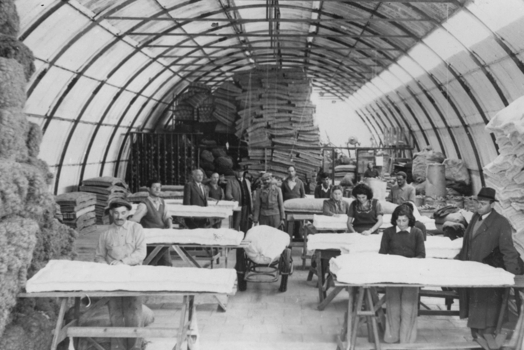 אברהם זכאי מארח ביקור של שאול אביגור במחנה א של המוסד לעליה ב' במג'נטה